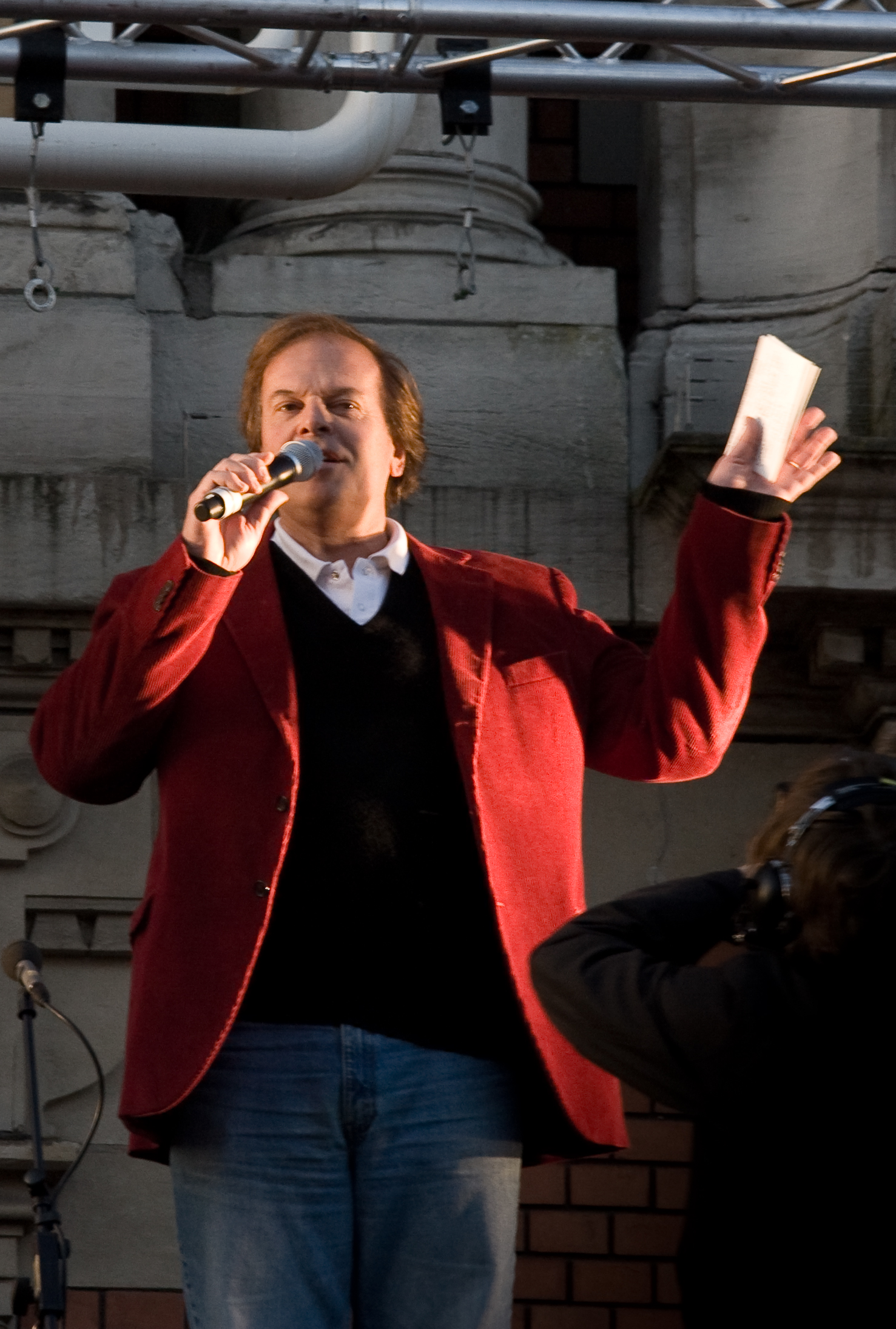 "Nederland Schreeuwt Om Cultuur - Duizenden cultuurminnaars hadden zich verzameld bij de Stadschouwburg om mee te schreeuwen tegen de verschraling van het culturele leven. Vanaf het Ajaxbordes van de Stadsschouwburg hielden bekende en minder bekende Nederlanders onder leiding van spreekstalmeester Ivo Niehe 'one-minute-statements'."